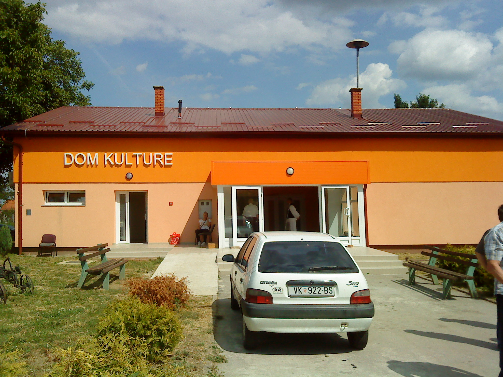 Ójankovác, művelődési ház